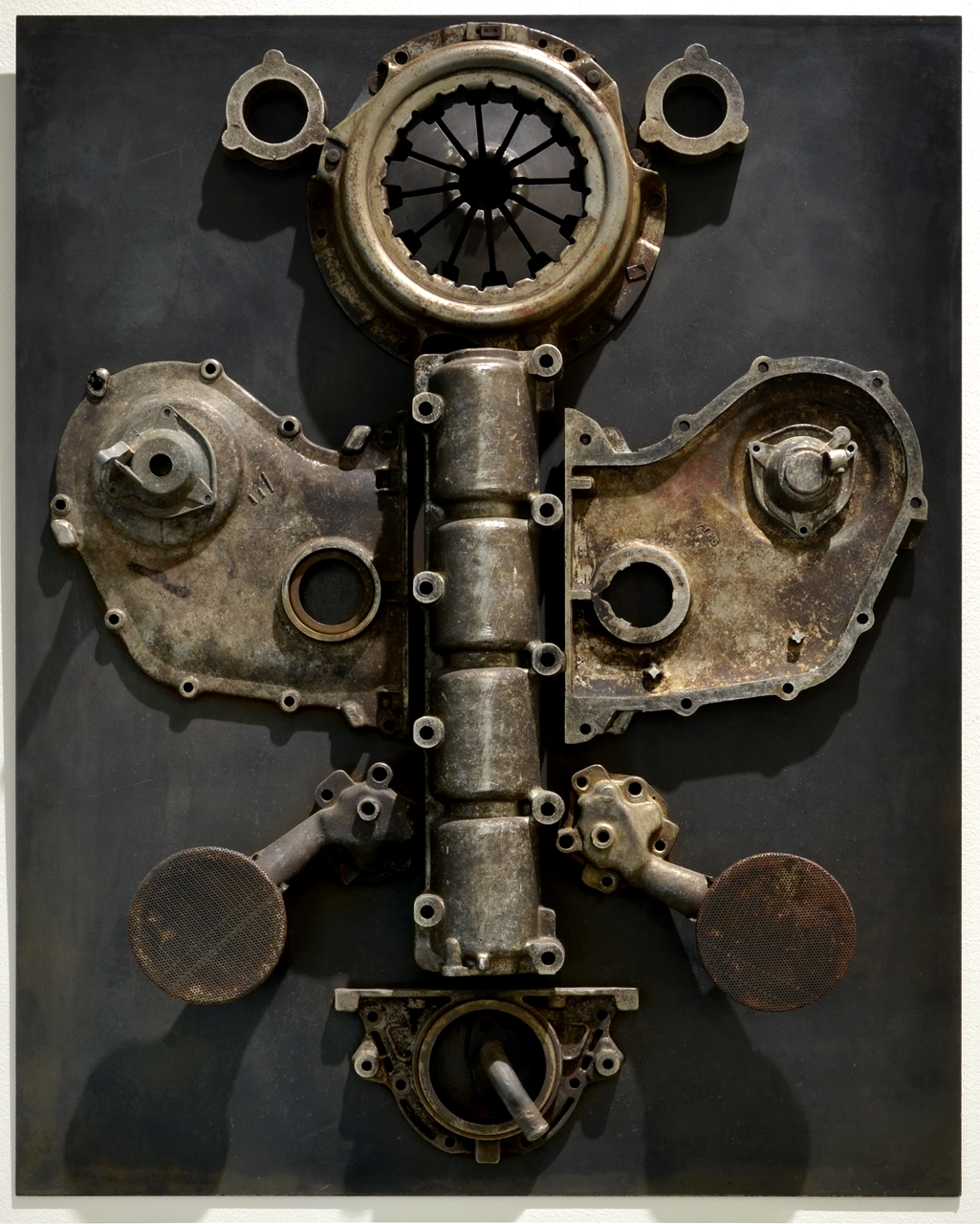 Theodor Pištěk, Leť motýlku leť, asambláž (1962), Galerie Zlatá Husa